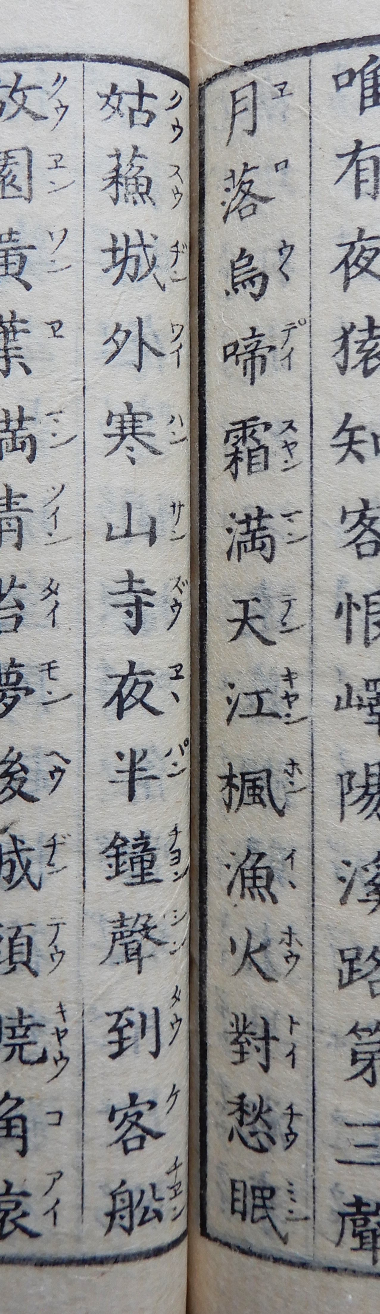 安永6年(1777年)刊『唐詩選唐音』より。張継の七言絶句「楓橋夜泊」の部分。